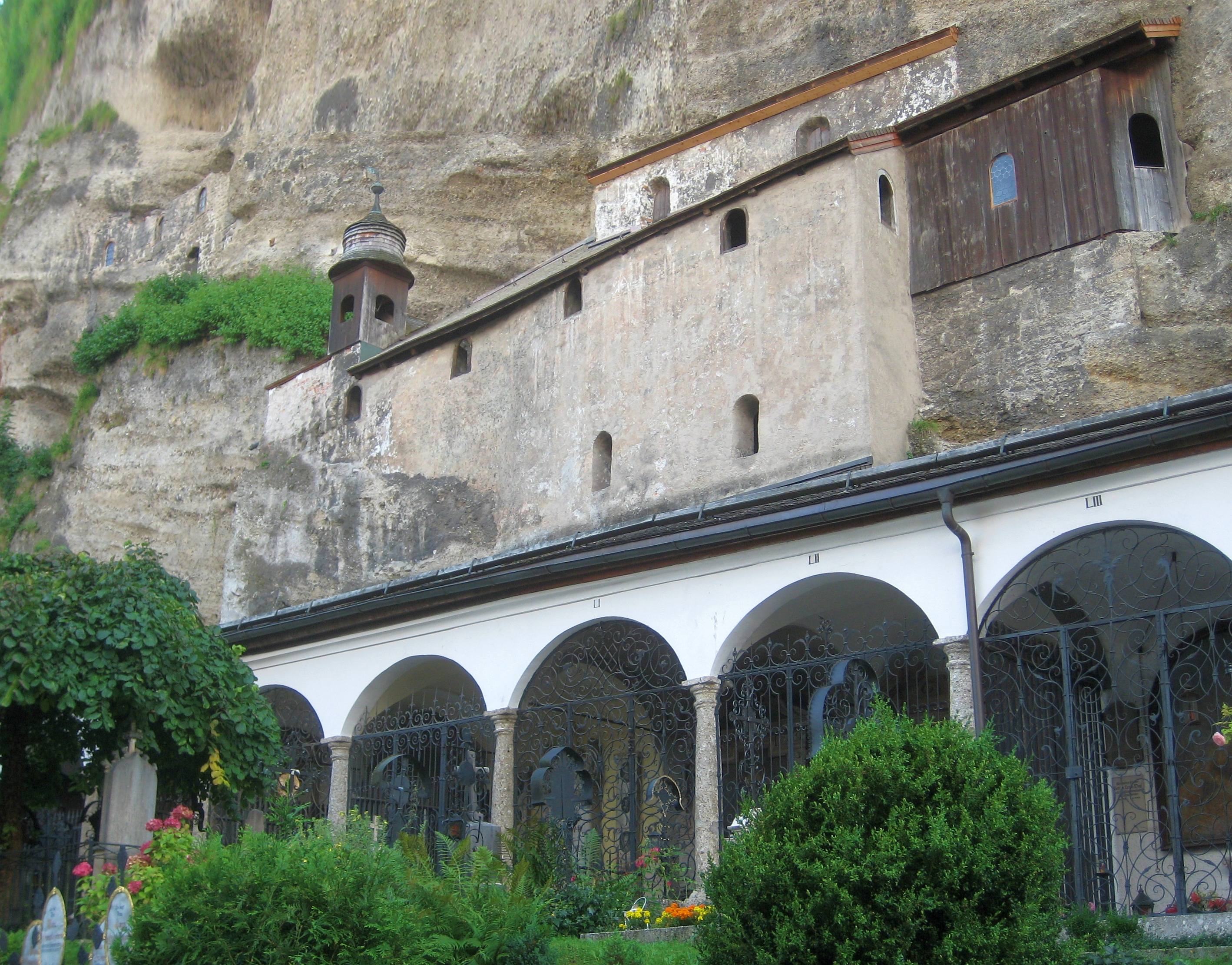 Blick auf die sog. Katakomben über dem Petersfriedhof in Salzburg